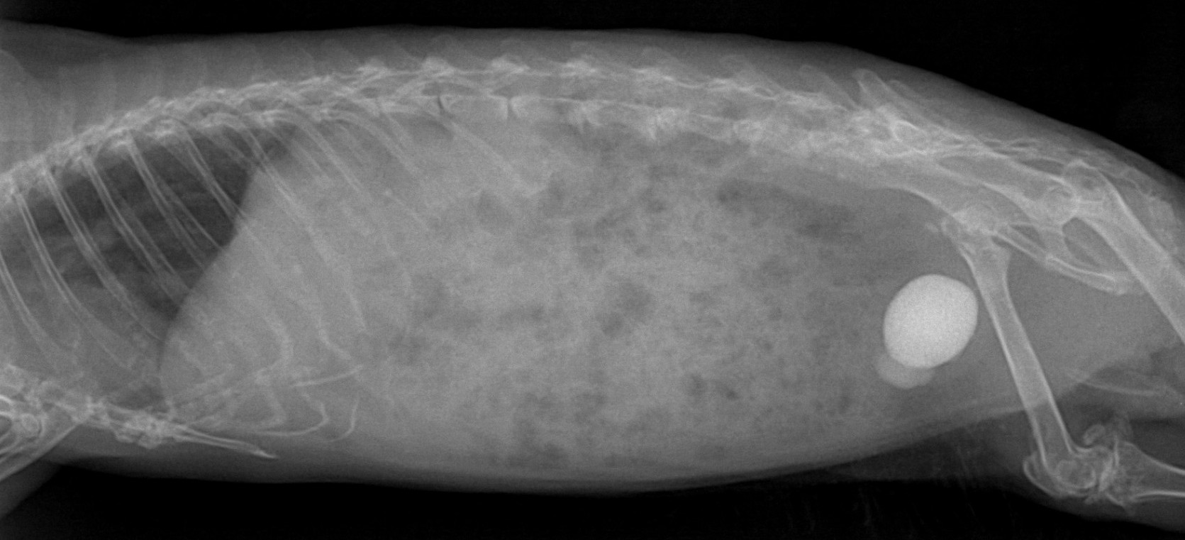 Blasenstein bei einem Meerschweinchen